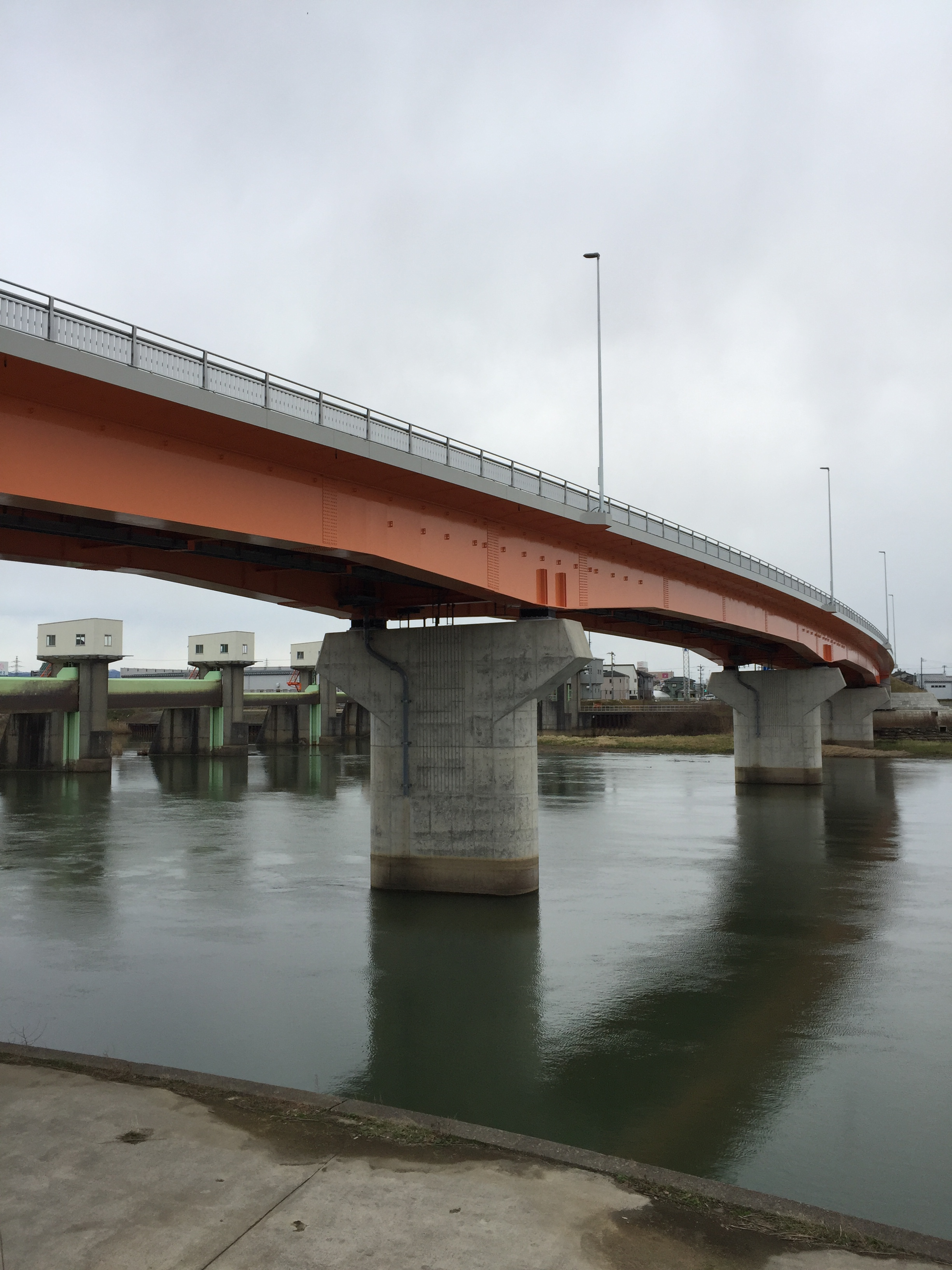 新潟県燕市の国道289号(燕北バイパス)朝日大橋を日之出町側から撮影